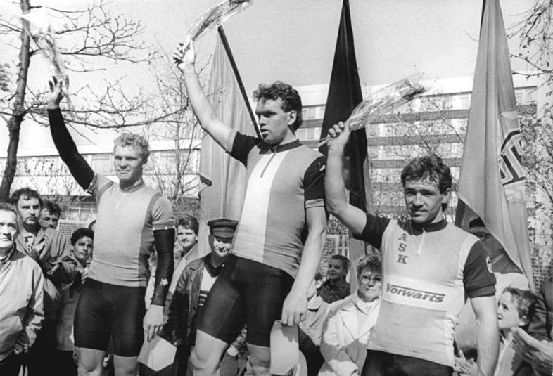 Maik Landsmann, Olaf Ludwig, Dan Radtke ADN-ZB Gahlbeck 22.4.88-A-Leipzig: Das Radrennen Dresden - Leipzig über 168 Kilometer - ausgetragen auf der Strecke der 11. Etappe der 41. Friedensfahrt 1988 - gewann Olaf Ludwig , SC Wismut Gera (M.), vor Maik Landsmann, SC Turbine Erfurt (l.), und Dan Radtke, ASK Vorwärts Frankfurt-O.